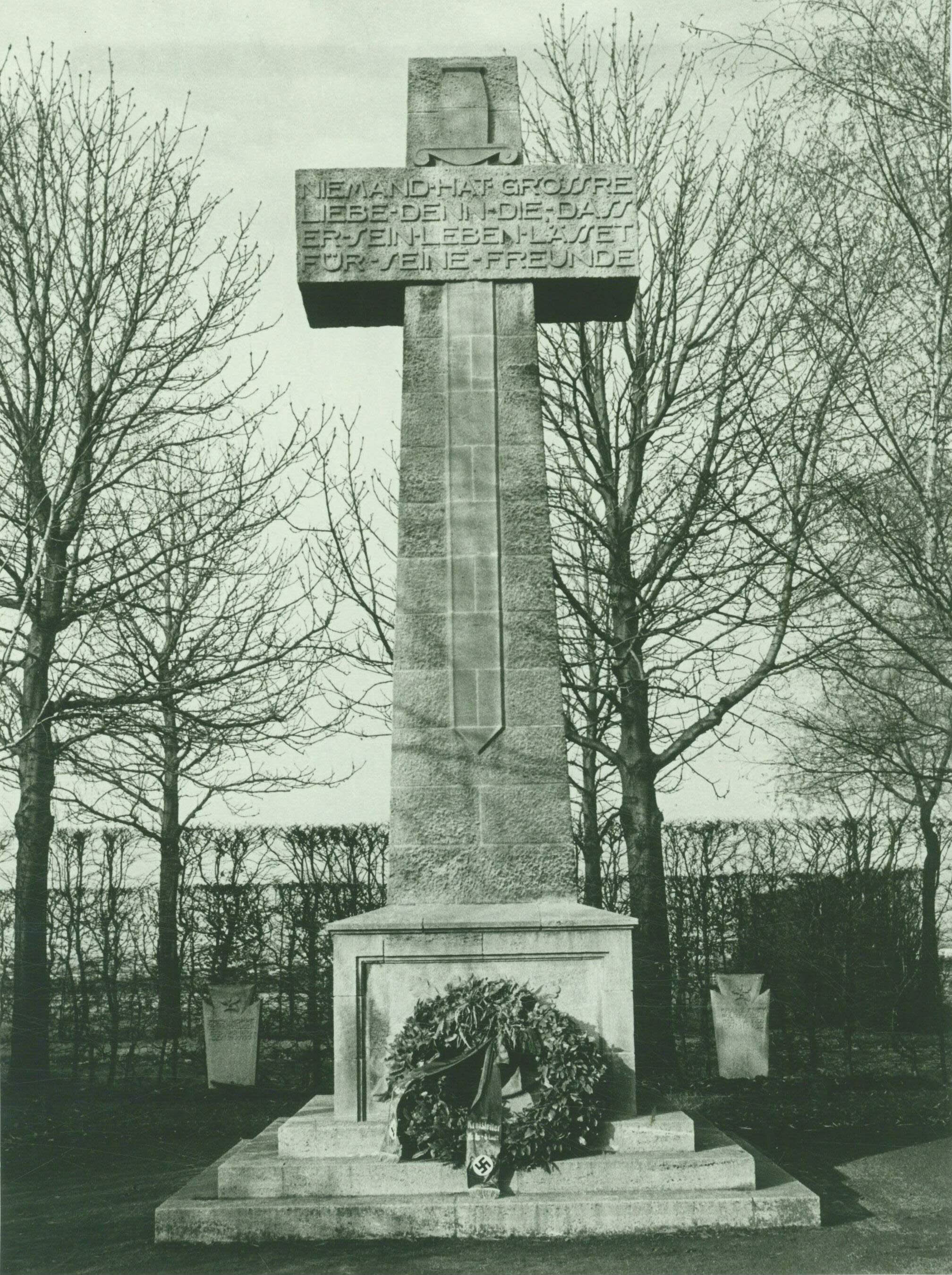 Denkmal für die Hallenser Zeitfreiwilligen auf dem Gertraudenfriedhof in Halle an der Saale.